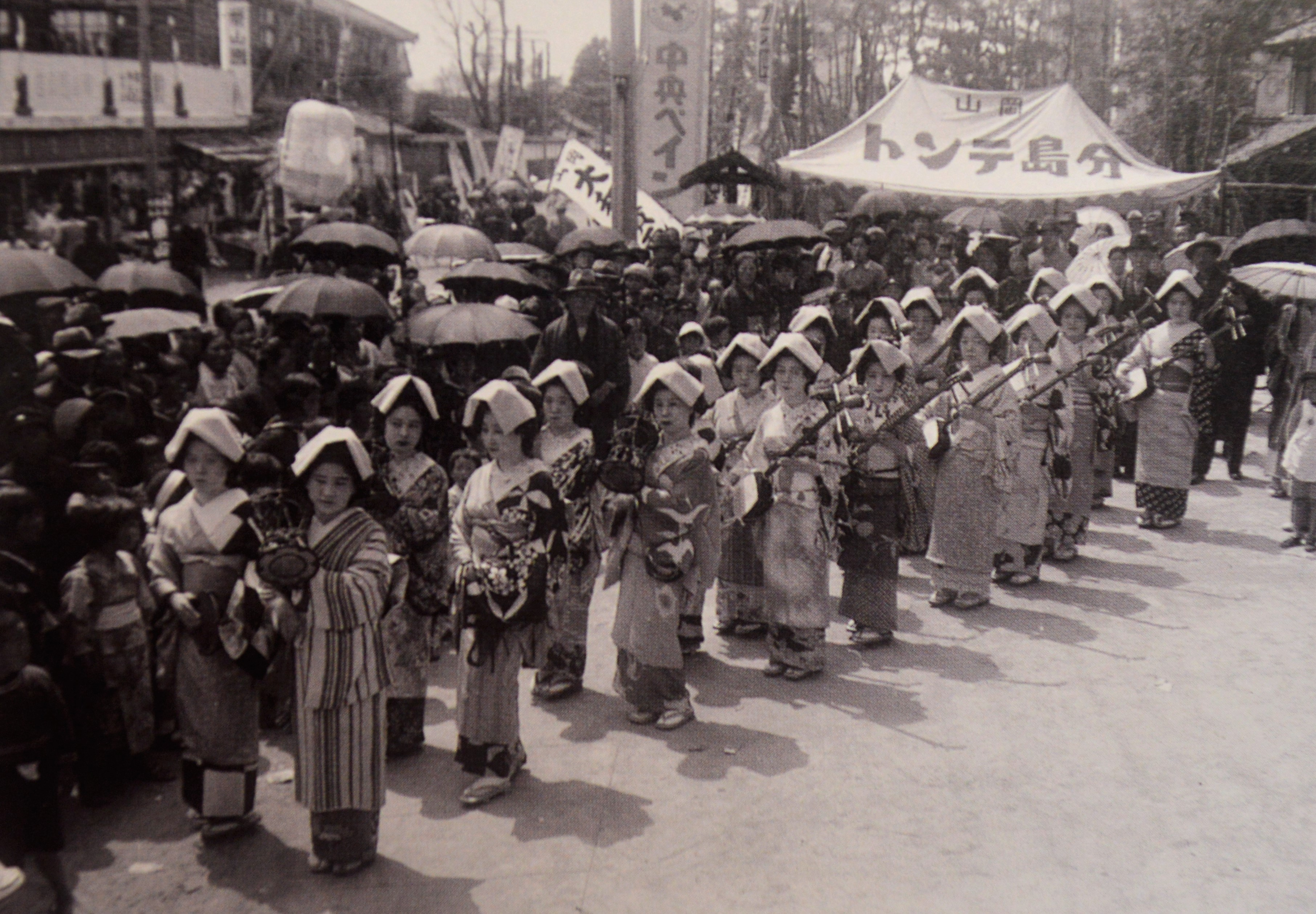 1936年の姫津線全通記念産業振興大博覧会。津山の余興の芸者衆。